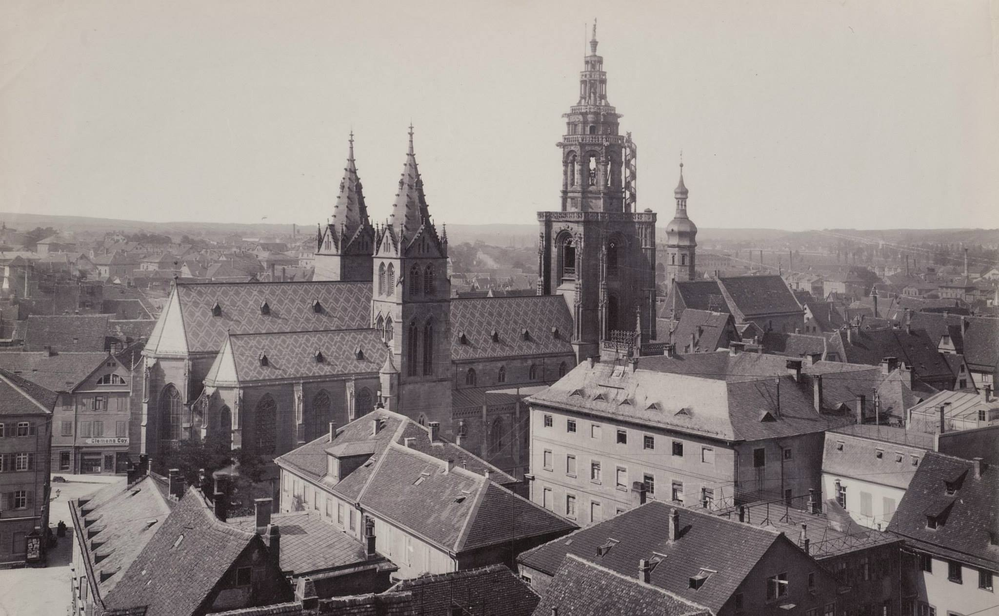 Blick vom Hafenmarktturm nach Südwesten auf die Kilianskirche in Heilbronn. Links von der Kilianskirche (angeschnitten) das Haus des Bäckermeisters Gräßle, der Treffpunkt der Gräßle-Gesellschaft. Rechts vor der Kilianskirche das Rauch’sche Palais am Marktplatz (sichtbar ist die Rückseite), hinter der Kilianskirche die katholische Kirche St. Peter und Paul (heutiges Deutschordensmünster).